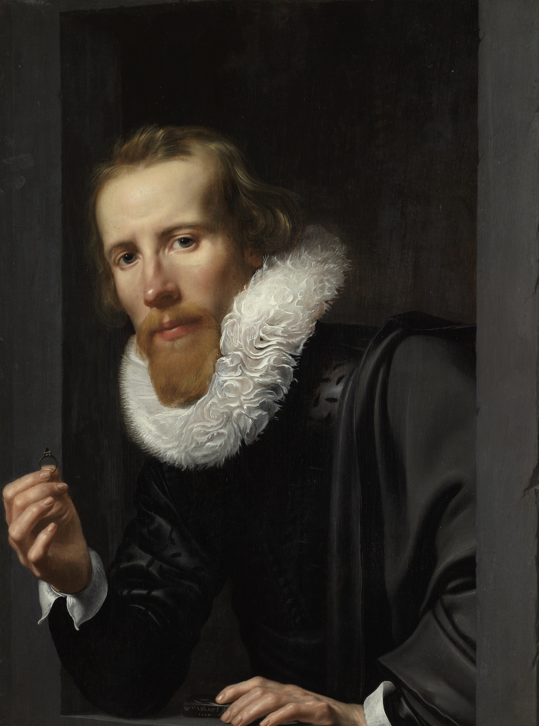 Portret van een man met een ring en toetssteen, waarschijnlijk Bartholomeus Jansz van Assendelft (1585-1658), goudsmid te Leiden. Ten halven lijve, voorover gebogen uit een venster geleund, een ring in de rechterhand en een toetssteen in de linkerhand.; Werner van den Valckert, (ca. 1580–in of na 1627), olieverf op paneel, 1617